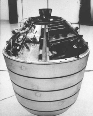 Vehicle de recuperació de pel·licules de satel·lits espia del tipus "Discoverer"